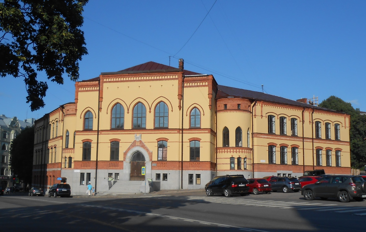 Бывшая Выборгская финская женская гимназия